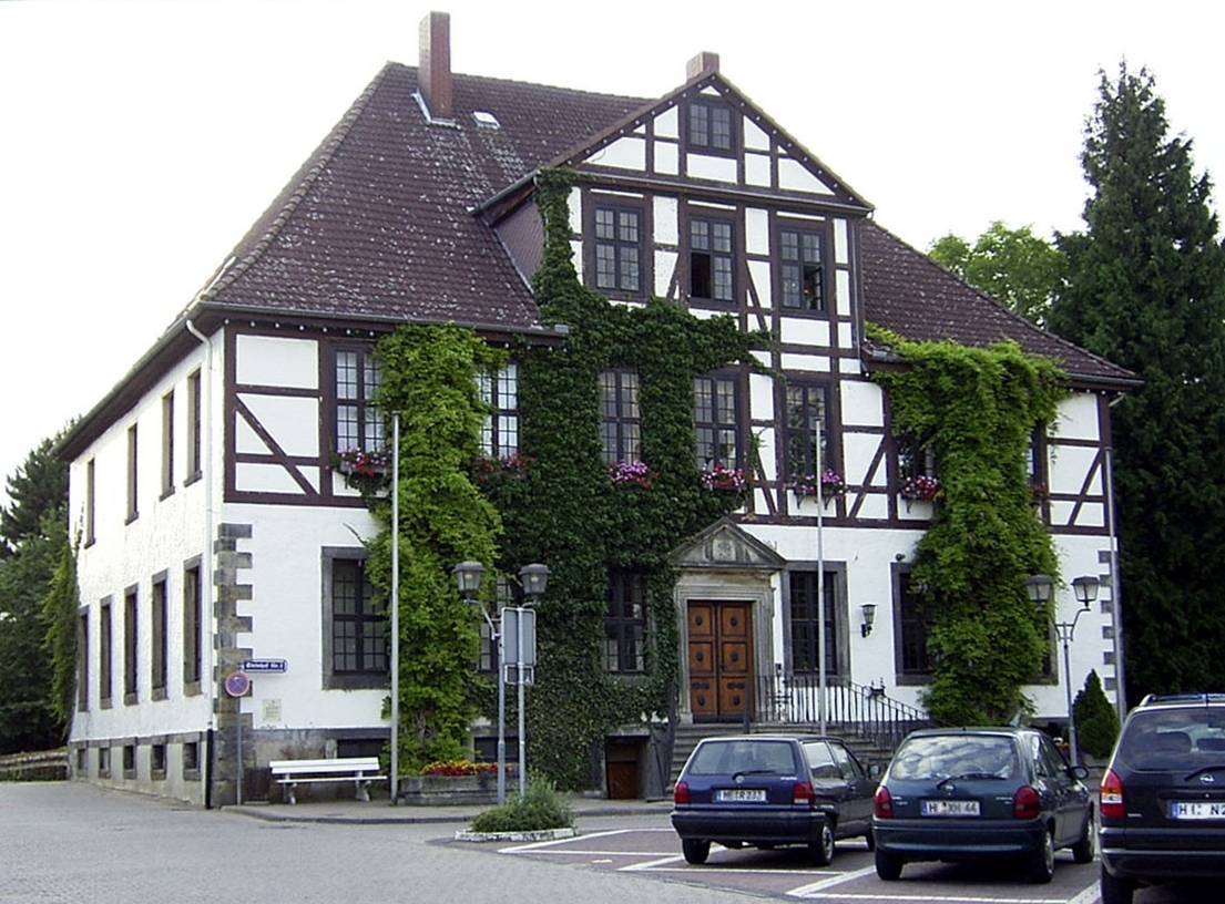 Der „Steinhof“ in Bad Münder am Deister, Landkreis Hameln-Pyrmont, Niedersachsen